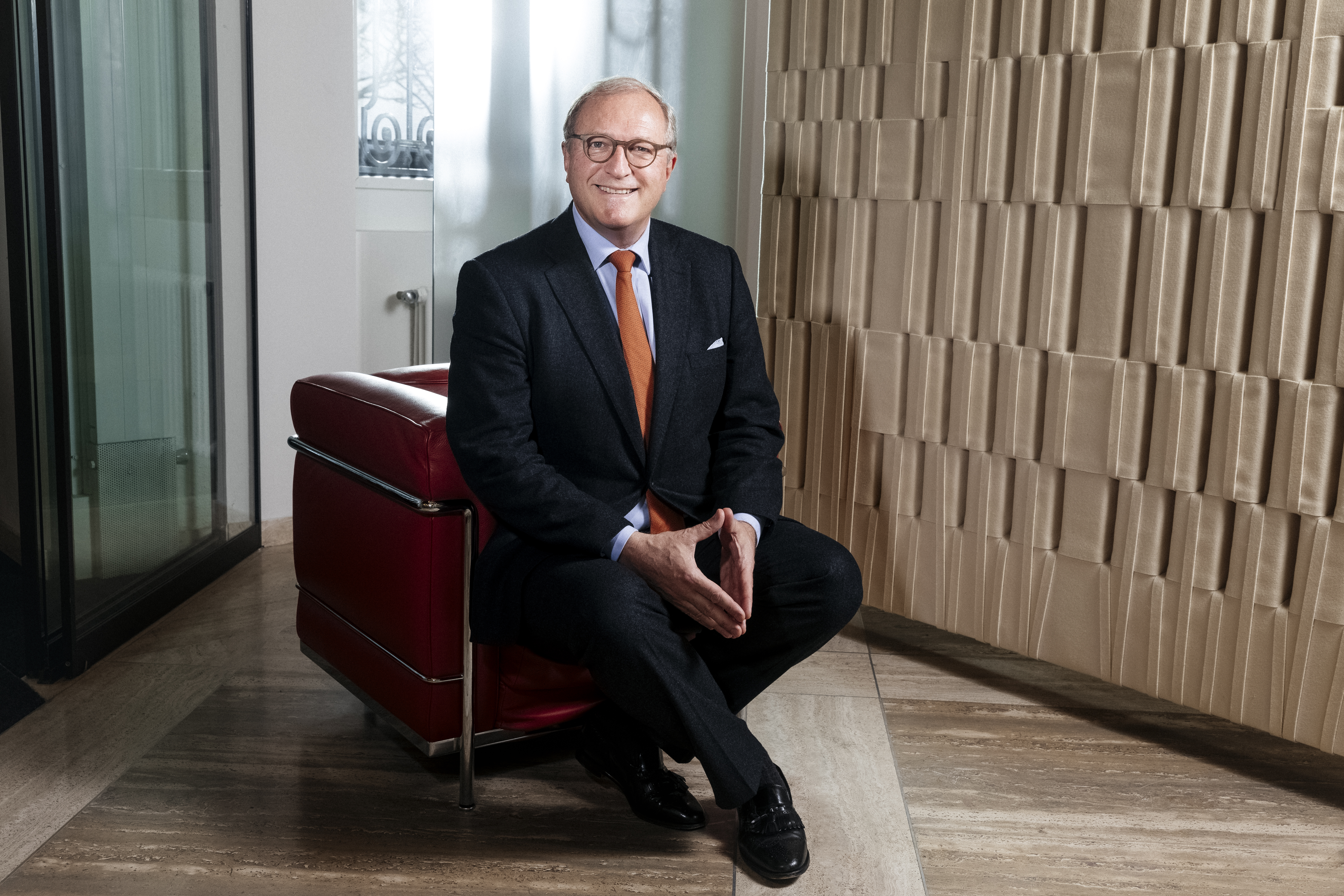 Jean Berthoud Président du CA de la banque Bonhôte